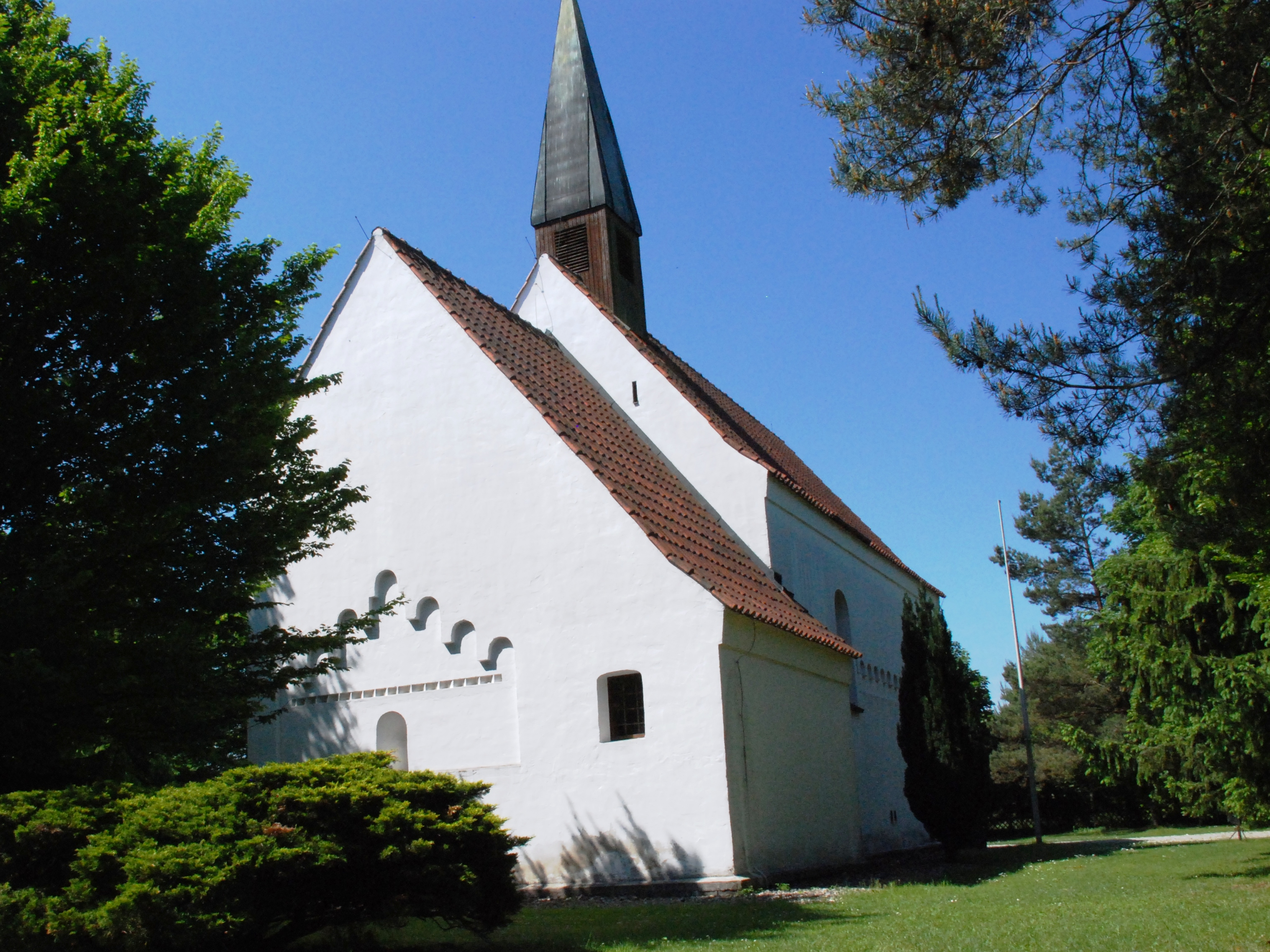 Denkmalgeschützte Kirche St. Martin in der Wüstung Mallertshofen, Gemeinde Oberschleißheim, Landkreis München